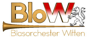 Logo